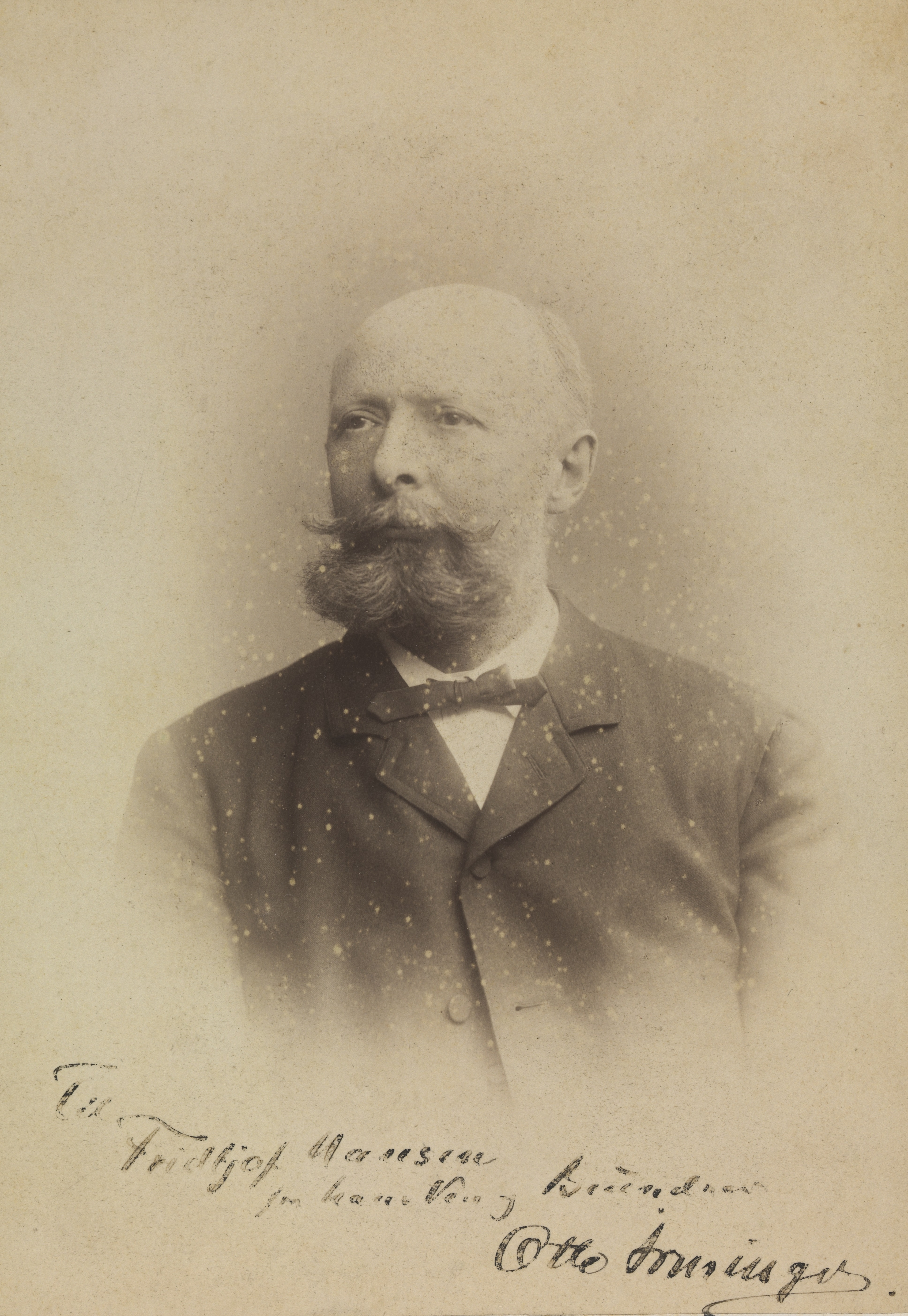 Otto Irminger, dansk sjøoffiser. Med dedikasjon. Depicted person: Irminger, Otto (1836-) Depicted place: Danmark, København